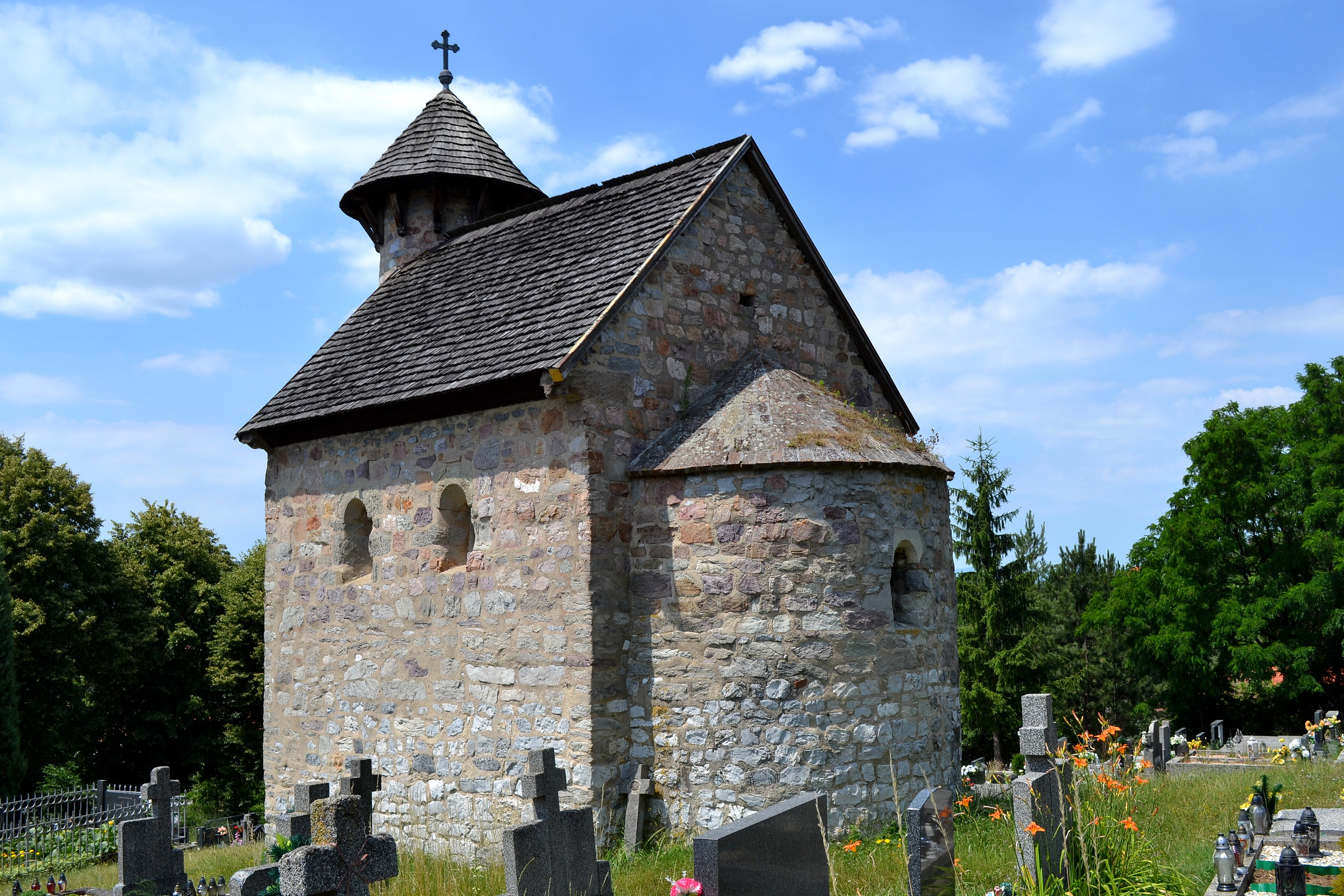 Veľký Klíž, Kostol svätého Michala archanjela v miestnej časti Klížske Hradište; celkový pohľad od juhovýchodu